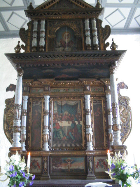 Altar, Skoger old church, Drammen, Norway